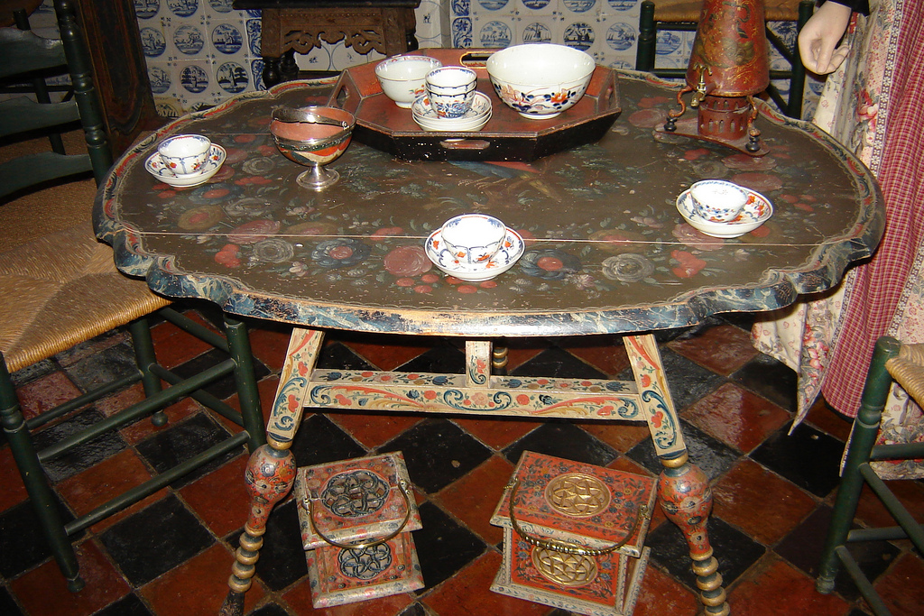 Hindelooper kamer Fries Museum Hindelooper kamer